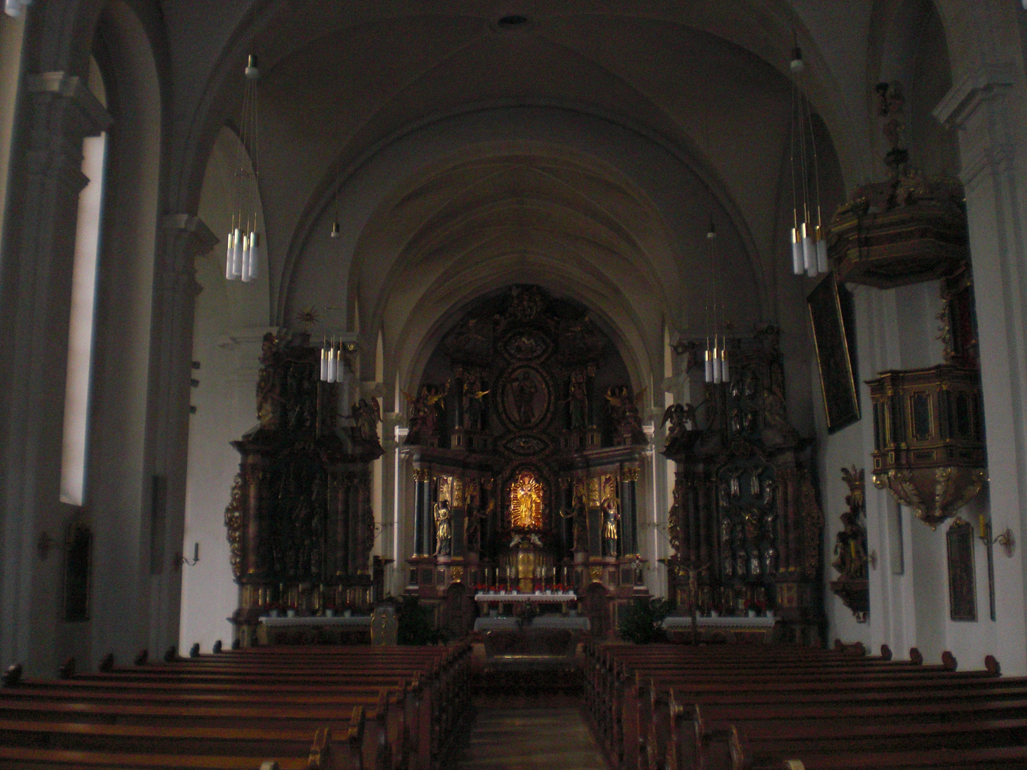 Innenansicht Kloster Altstadt